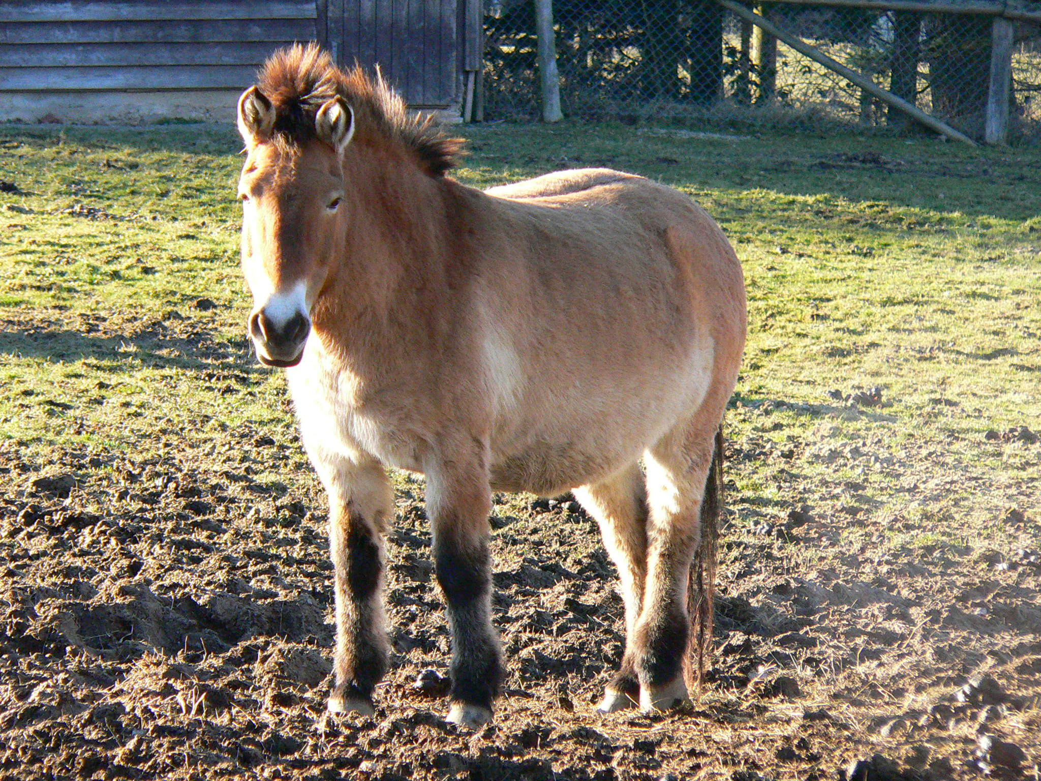 Im Tierpark Sababurg im Reinhardswald (Hessen), Przewalskipferd